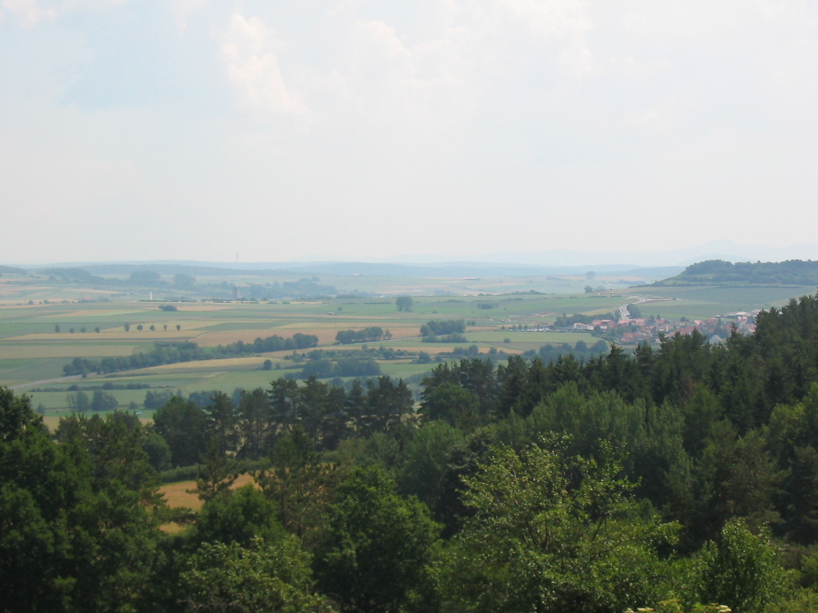 Kreisjugendheim und Zeltlager Landenhausen - Ein weiter Blick in das Fuldaer Land hin bis zu den Höhen der Rhön (Wasserkuppe und Milseburg)